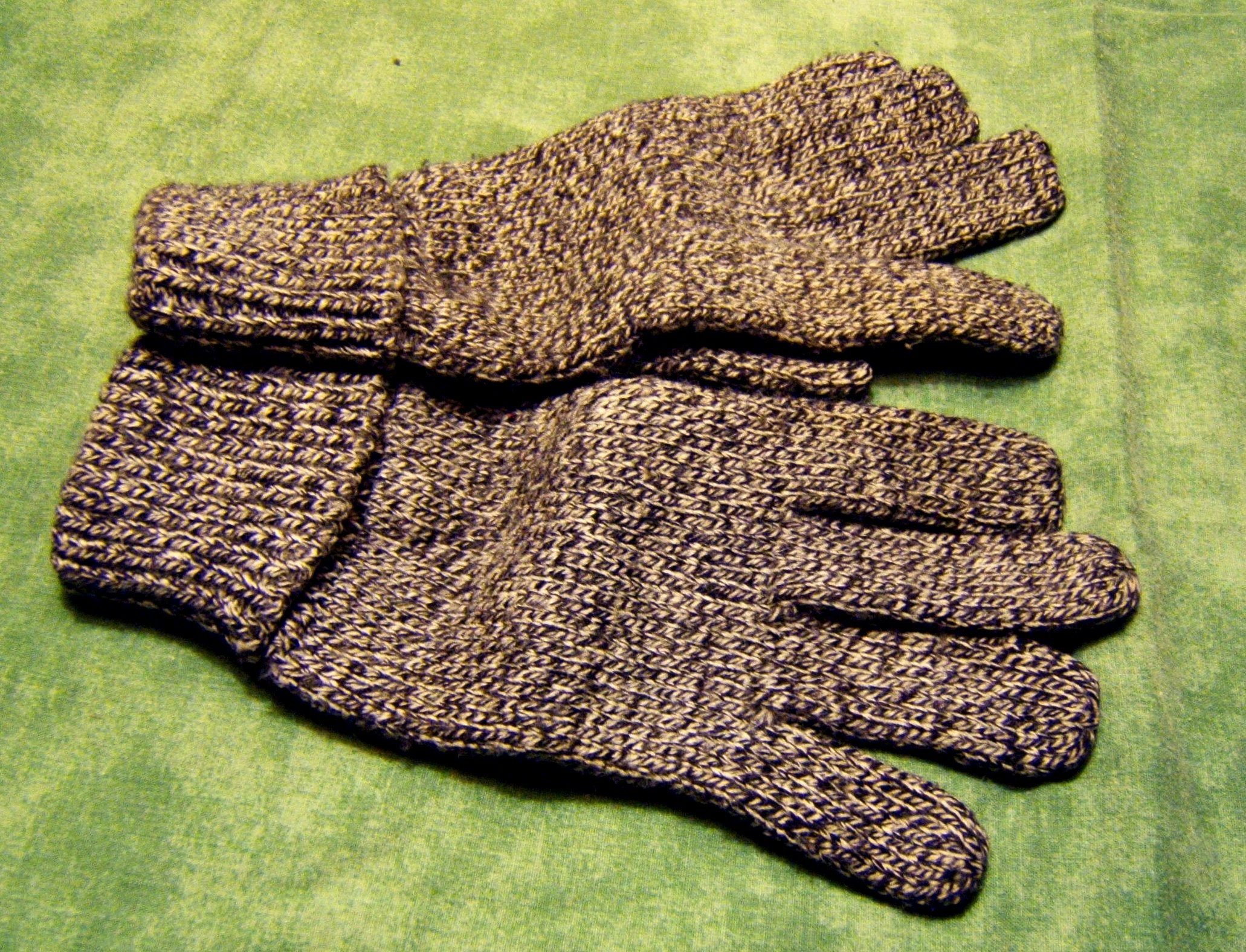 Gebreide handschoenen